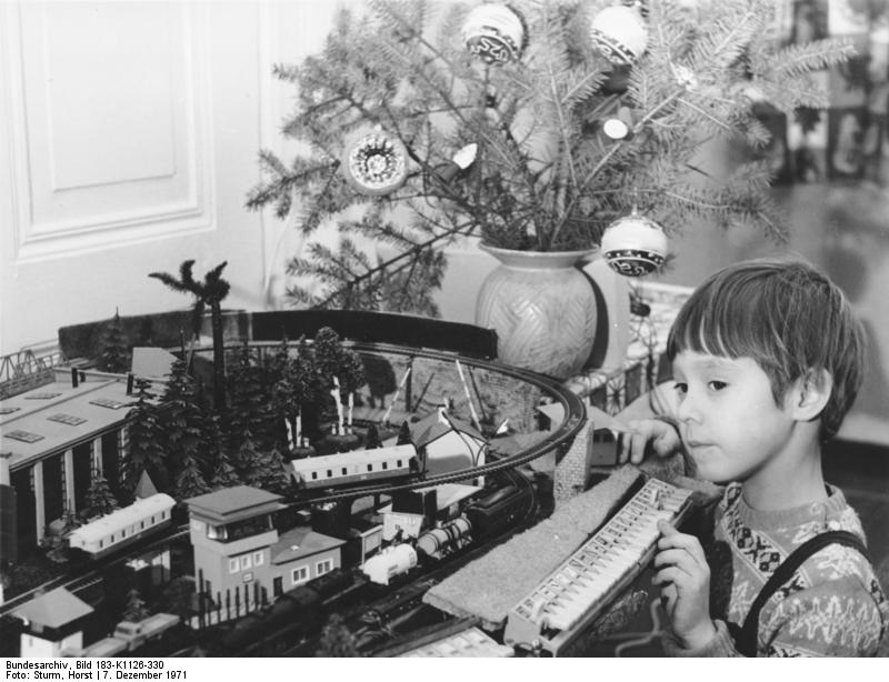 Kind vor Modelleisenbahn ADN-ZB/Deutsche Demokratische Republik. Endlich ist es soweit. Dirk gibt die Bahn frei. Sicherlich muß er sich oft mit Vati das Spielzeug teilen und nutzt nun die Gelegenheit, die Fahrziele einmal allein fetzulegen. Bei einer Modelleisenbahn kann man niemals sagen, wo das Spiel aufhört und der Berufswunsch anfängt. Sie ist zu recht schon längst nicht nur Spielzeug. Sie ist ein Stück lehrreicher und sinnvoller Freizeitgestaltung. K 1126/330 N